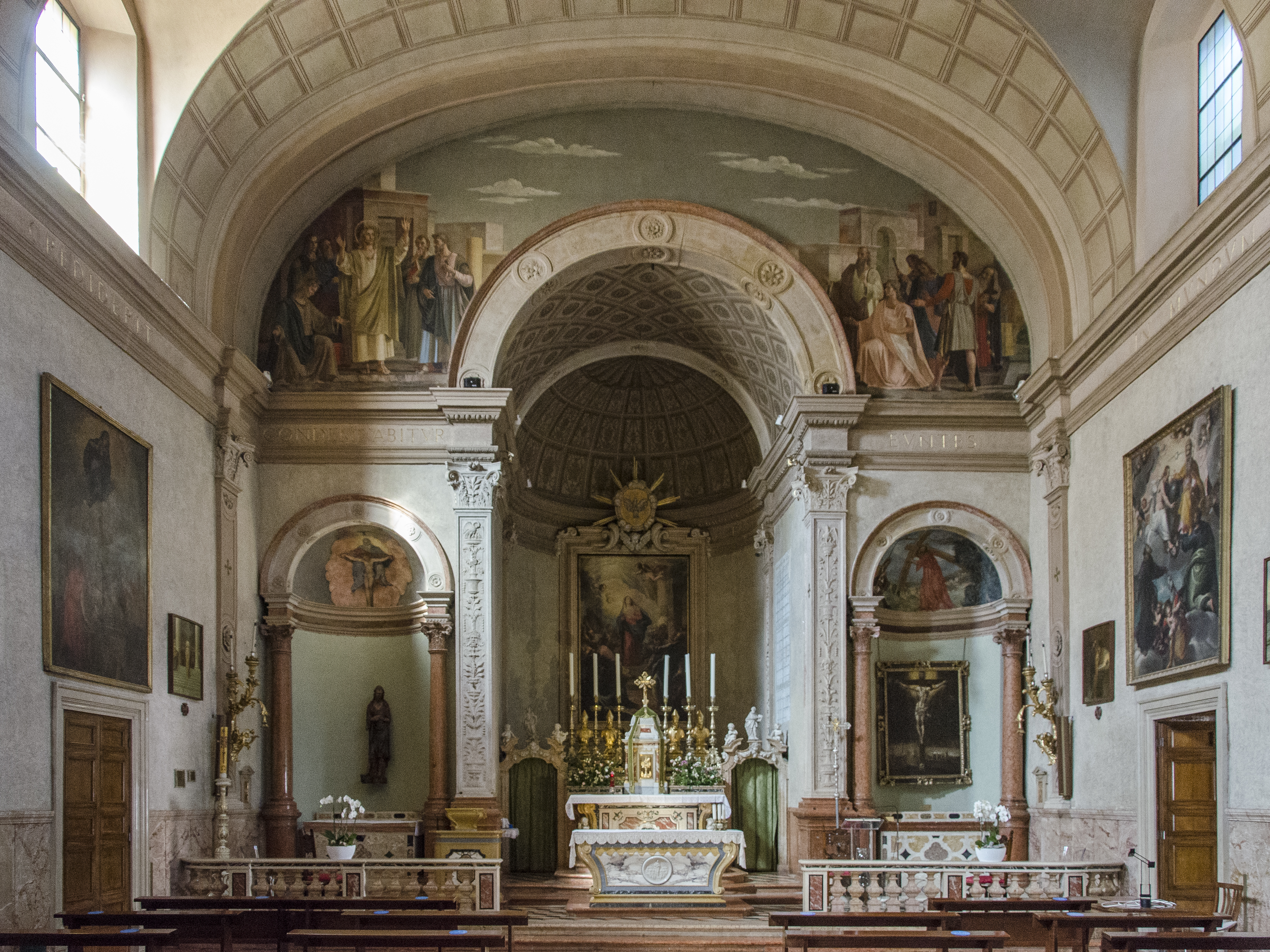 Chiesa dei Santi Apostoli a Verona, interno